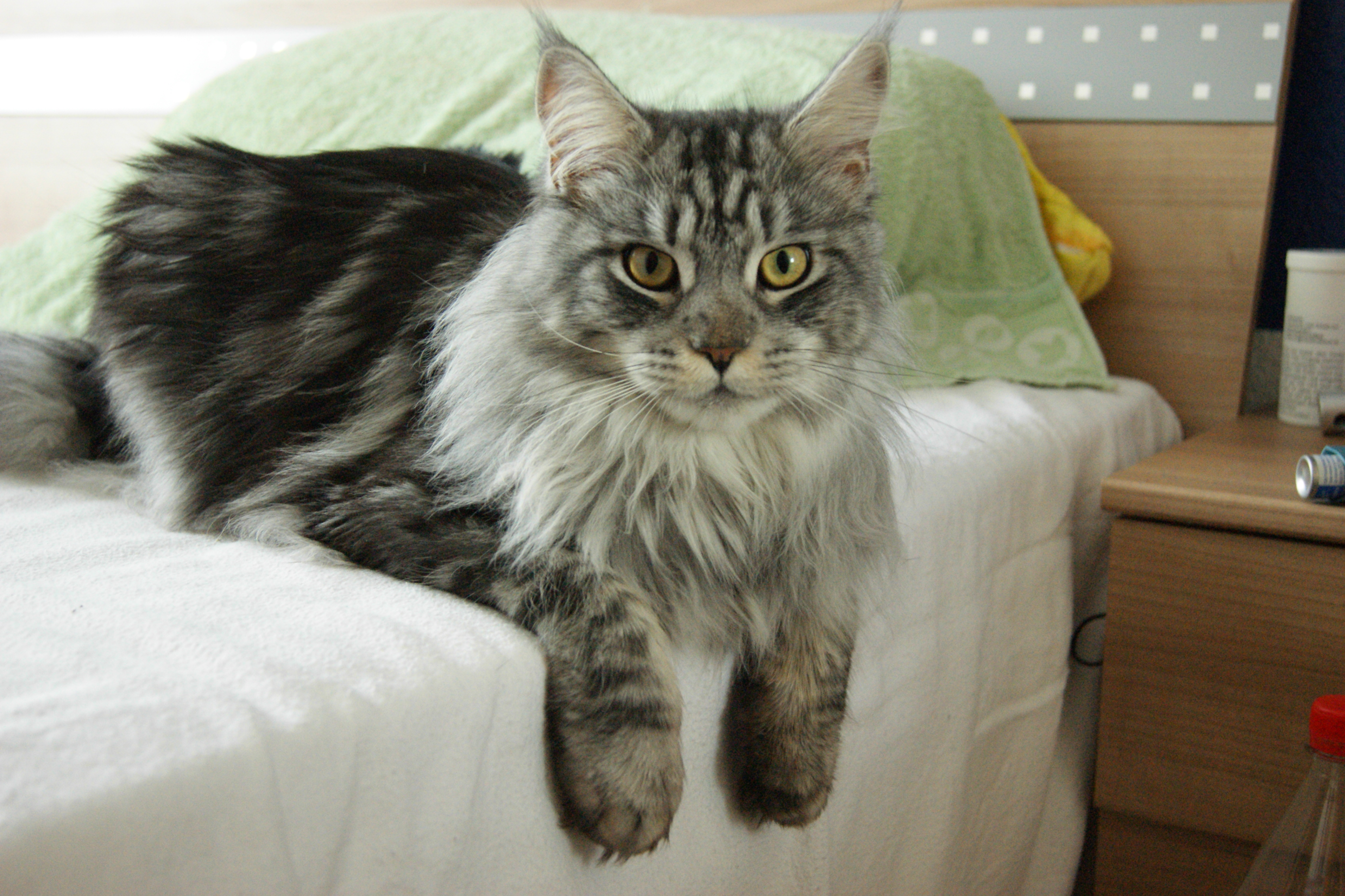 Maine Coon Fallen male Angel of Canadian Summer, 9 months old, Germany